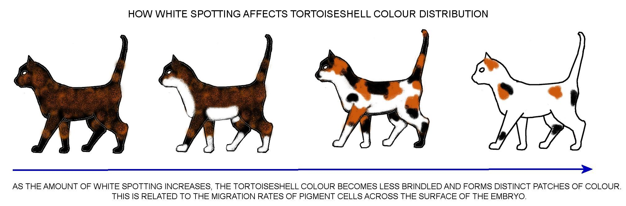 semakin banyak gen putih pada kucing, maka warna hitam-merah pada kucing semakin terpisah dan tidak bercampur